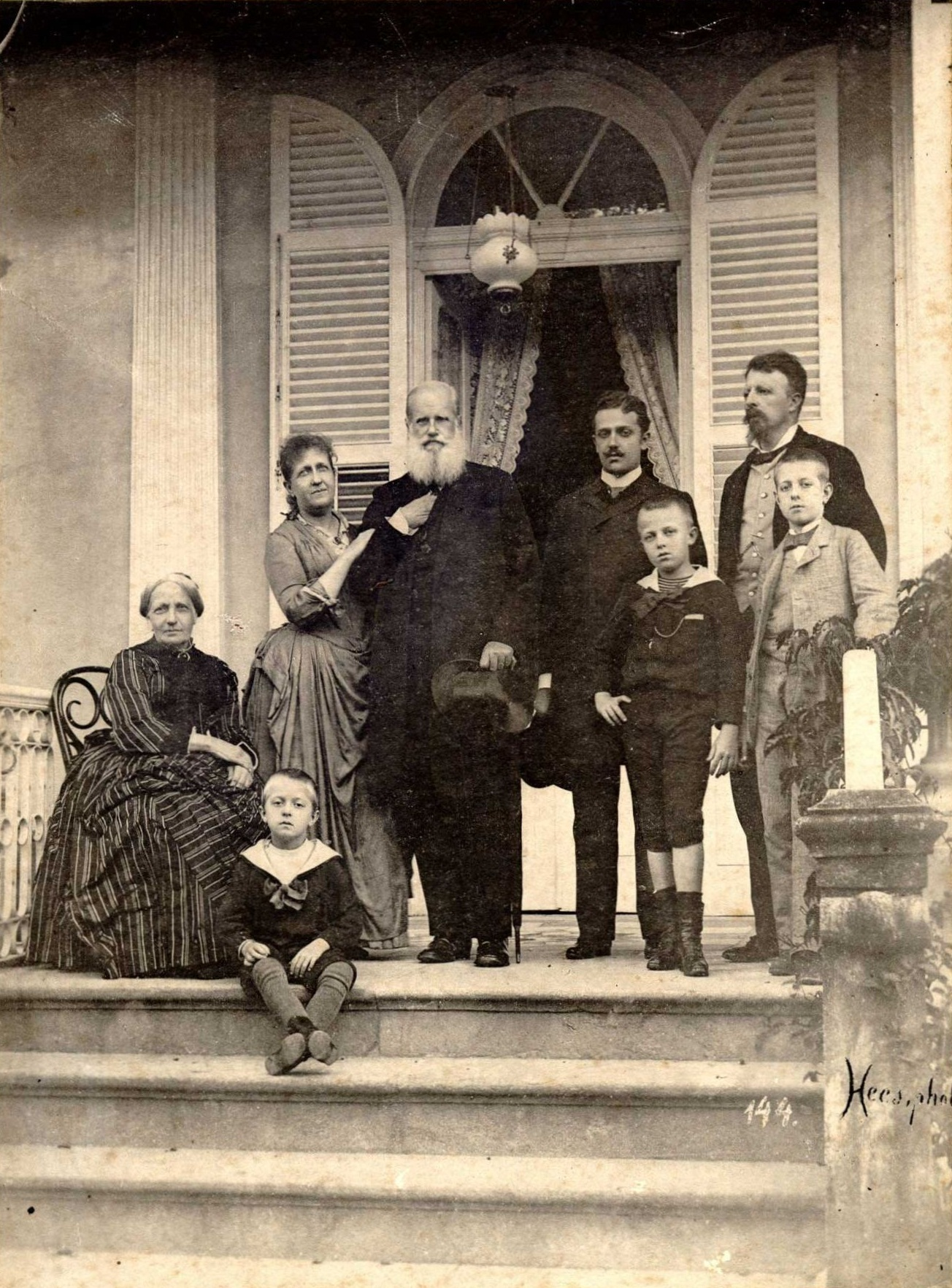 Dom Pedro II, Imperador do Brasil e a família imperial fotografada por Otto Hees.Legenda: Da esquerda para a direita: a imperatriz Dona Teresa Cristina, D. Antônio, a princesa Isabel, o imperador, D. Pedro Augusto (filho da irmã da princesa Isabel, d. Leopoldina, duquesa de Saxe), D. Luís, o conde d'Eu e D. Pedro de Alcântara (príncipe do Grão-Pará).